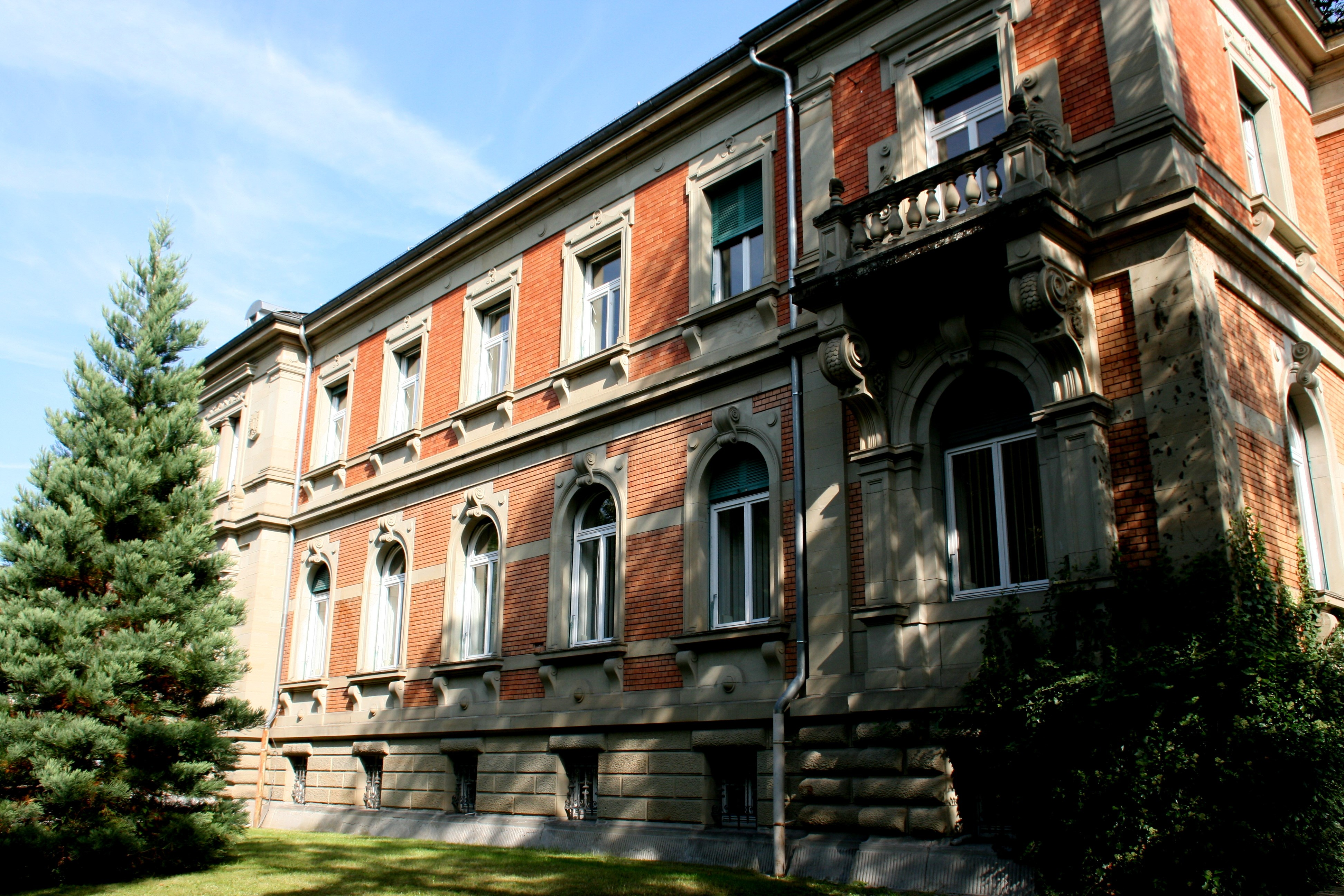 Amtsgericht, Bahnhofstraße 8 in Überlingen